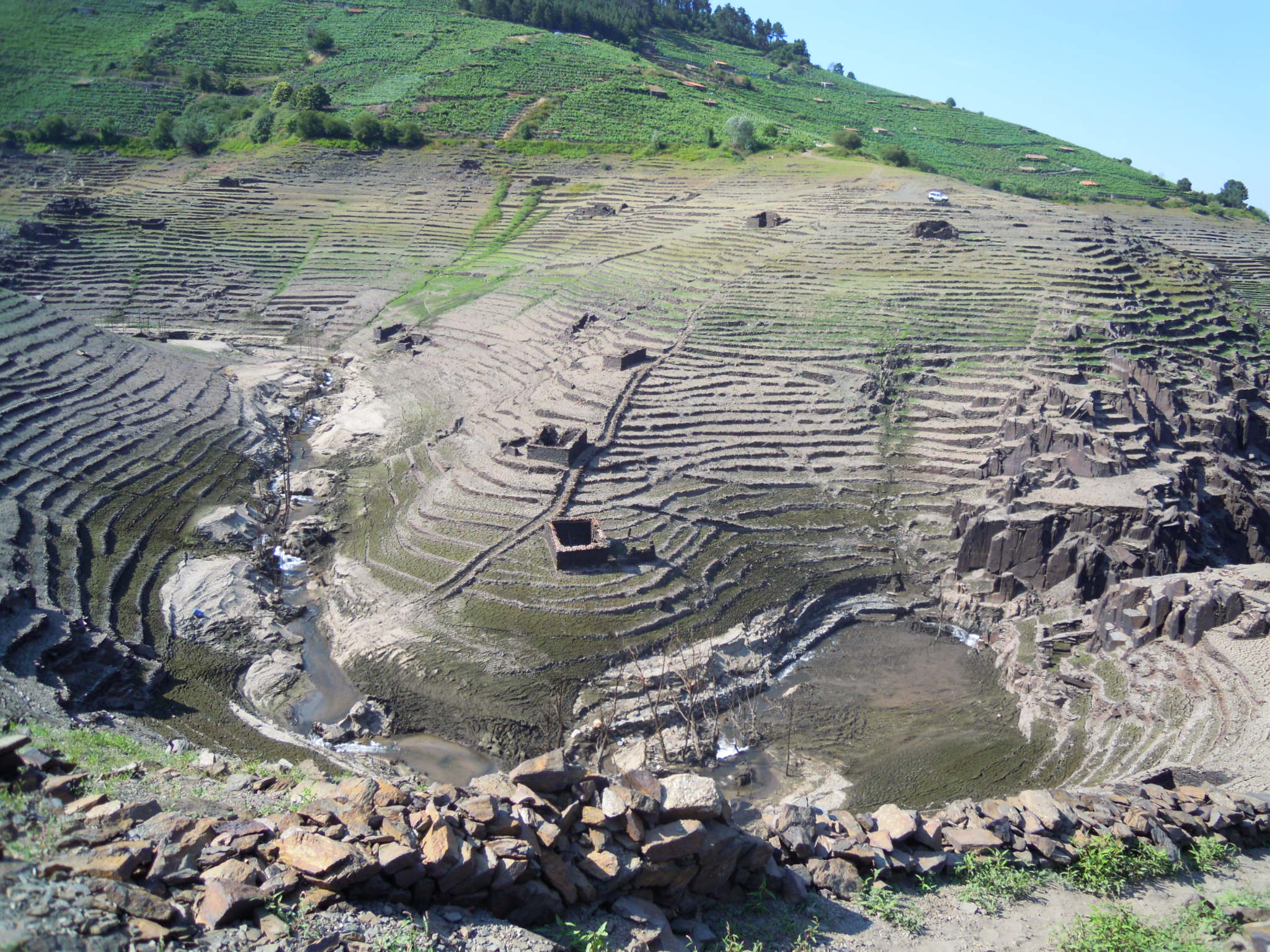 Tramo final do río Enviande, xusto antes de chegar ao río Miño. Vista de Sobrecedo desde o Castro Candaz. Adoita estar cuberto polo encoro de Belesar, que anega as abas antigamente usadas para plantar vide nos socalcos.